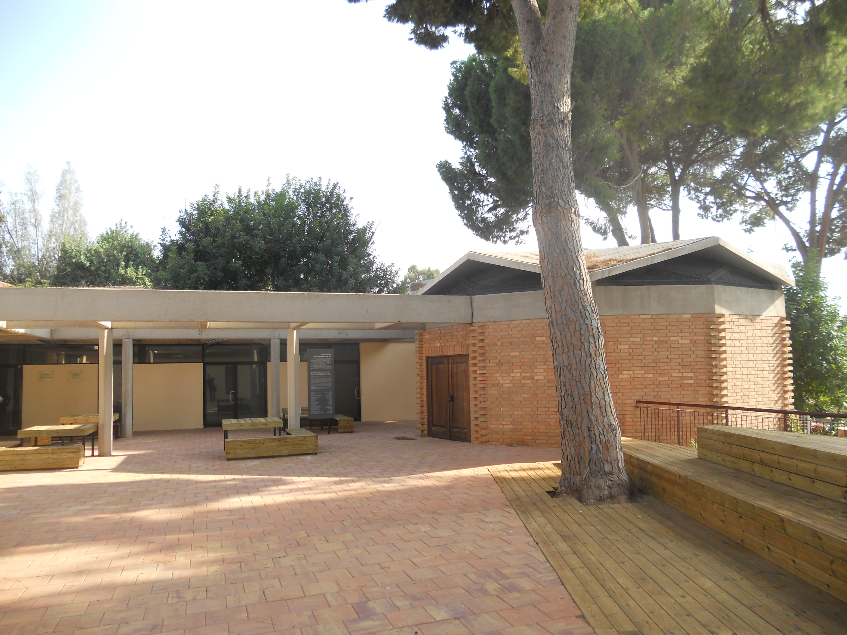 החצר החדשה של בית טרזין שנתרמה ע"י משפחת אולניק, נתניה